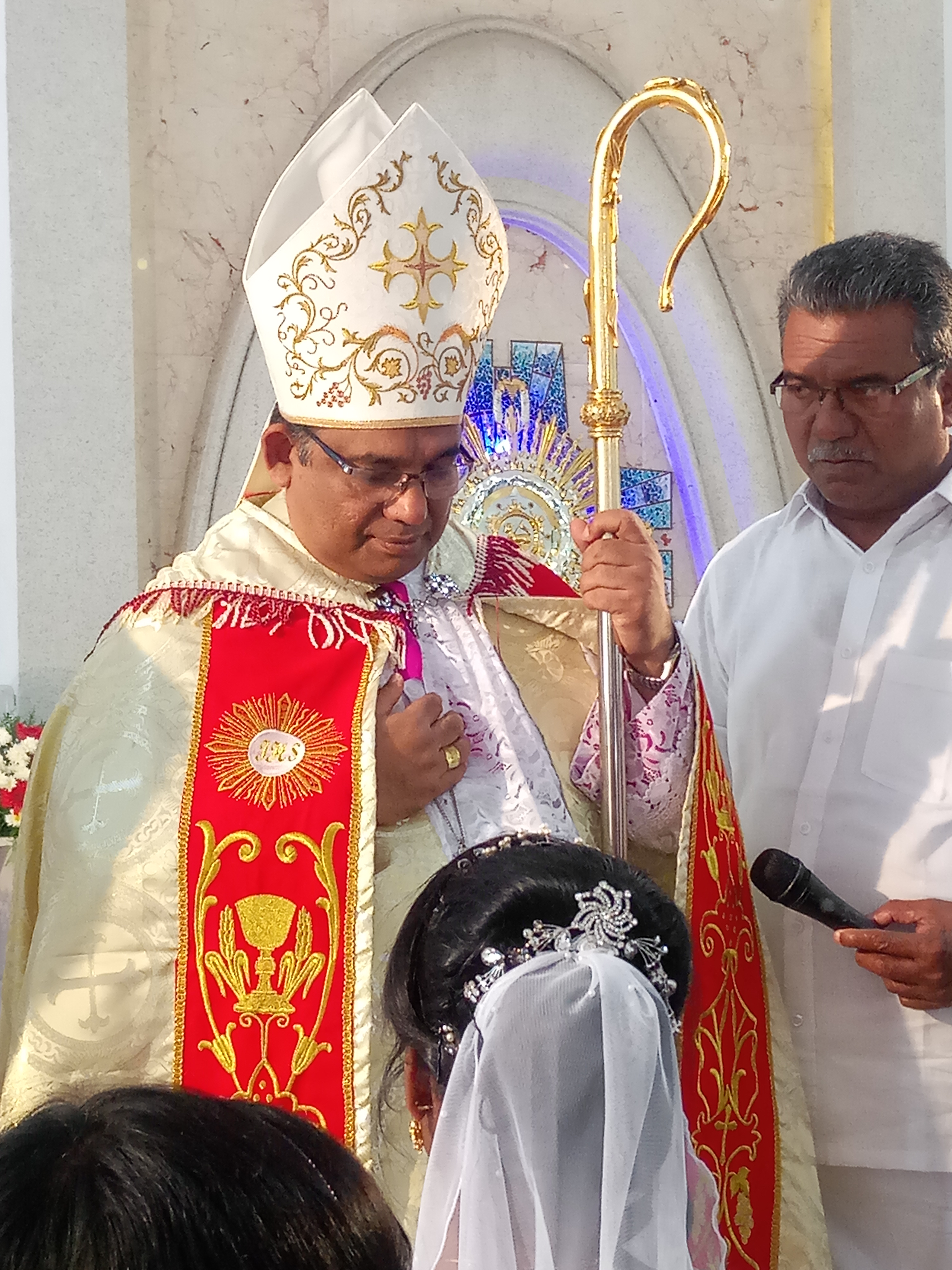 Paul Antony Mullassery, kath. Bischof von Quilon, Indien